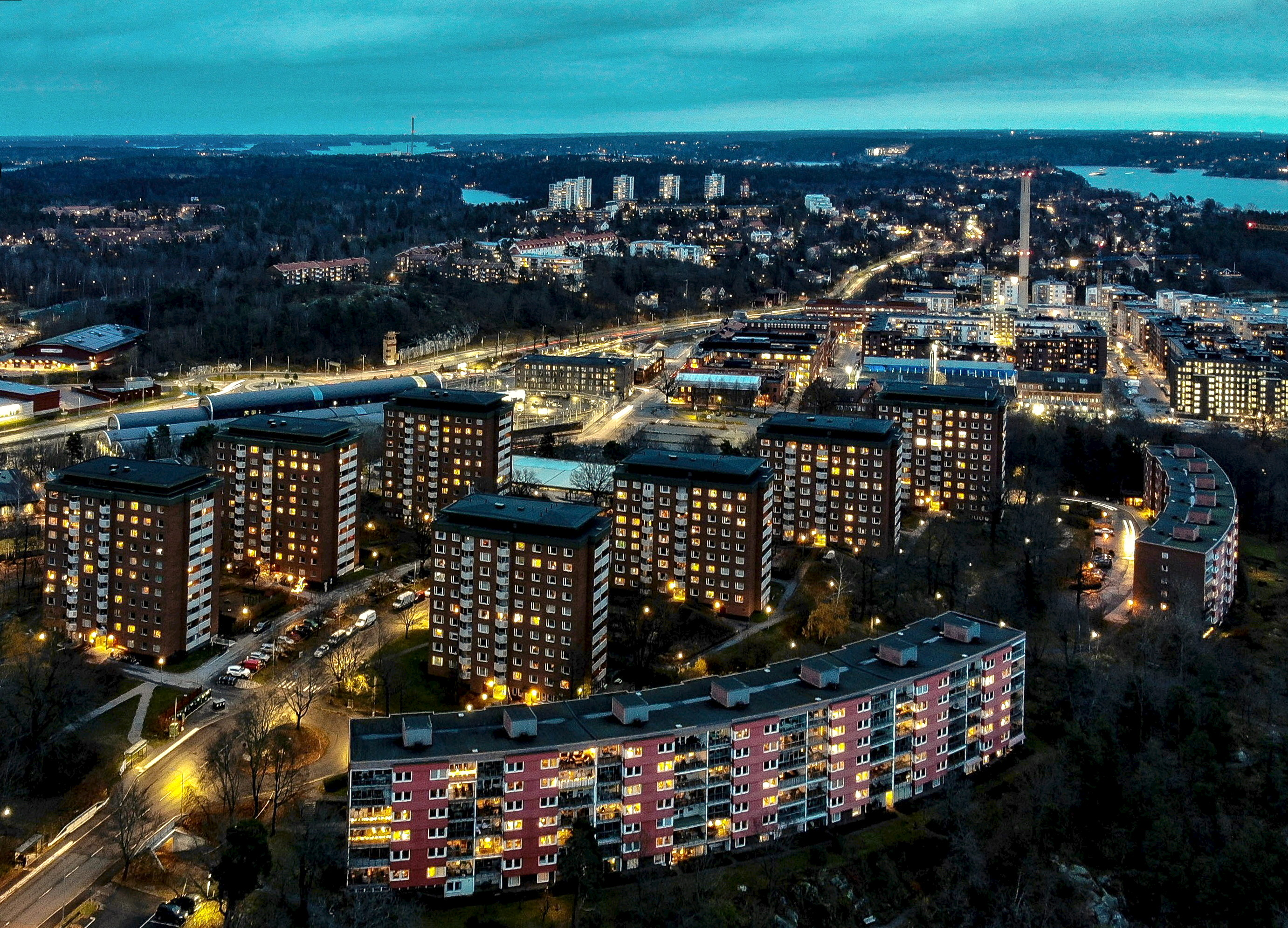 Larsbergs bostadsområde.